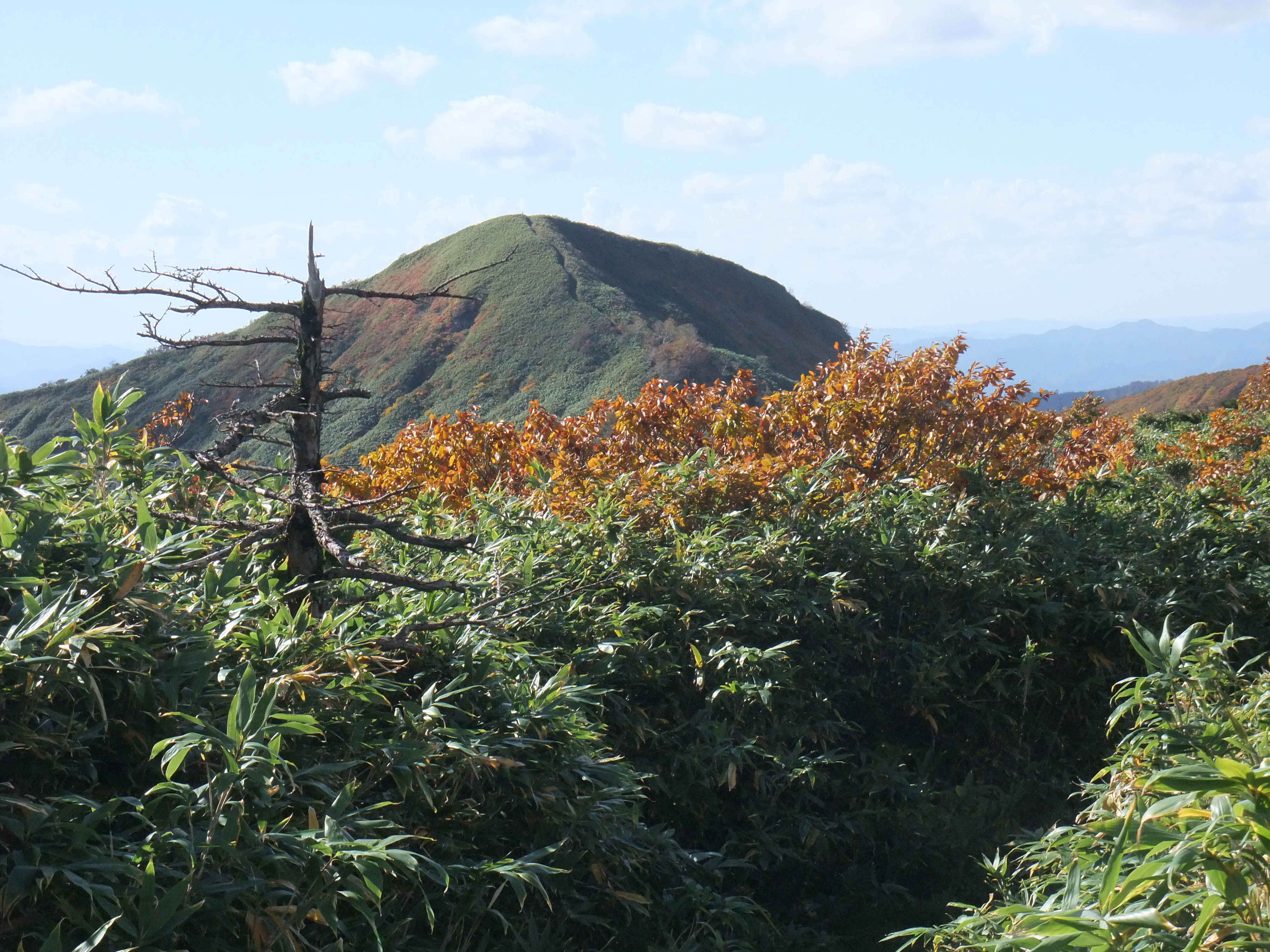 四角岳山頂付近より望む中岳